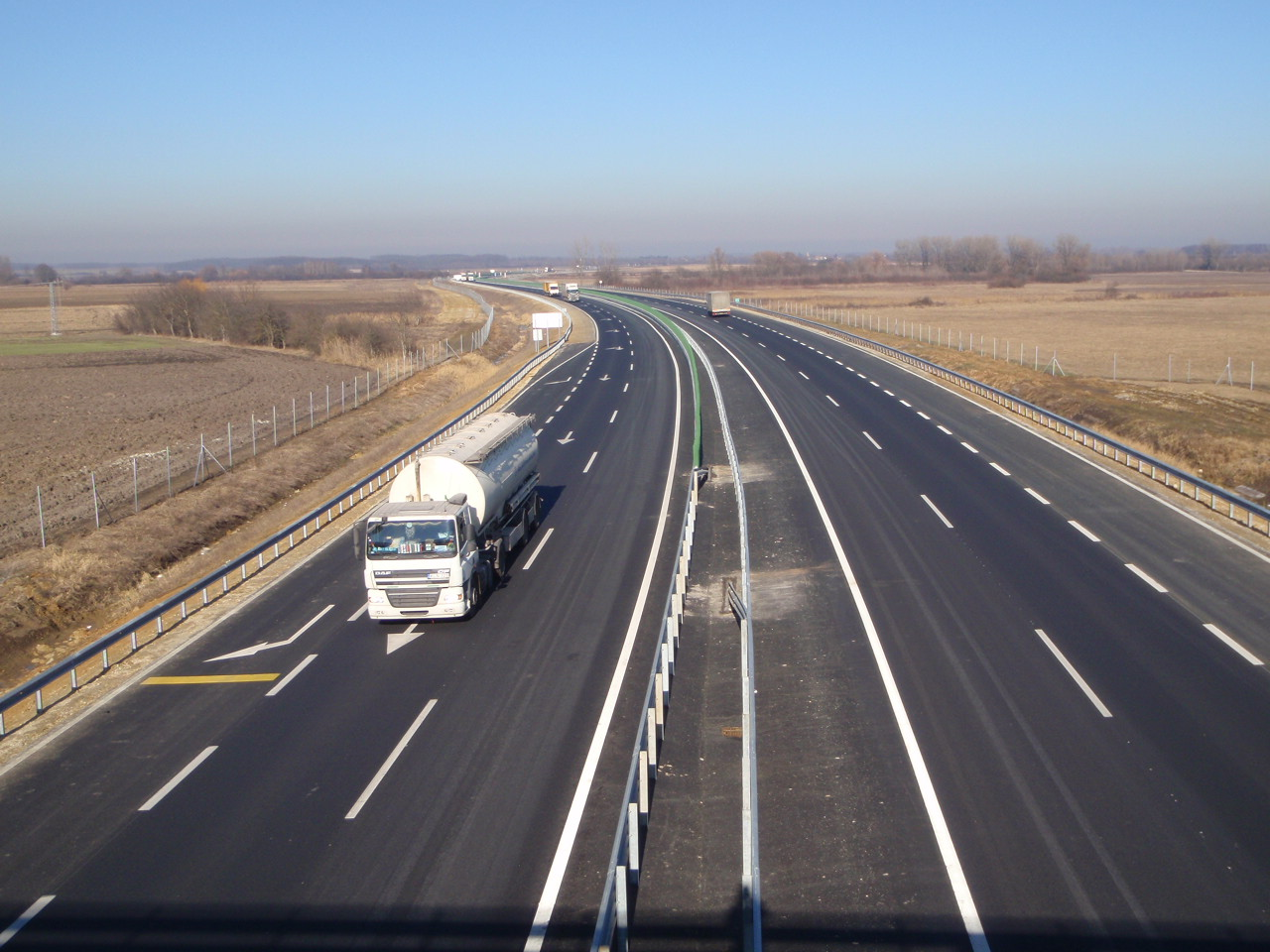 Steinamangererschnellstrasse M86